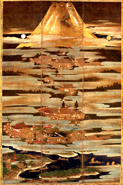 Fuji Mandara